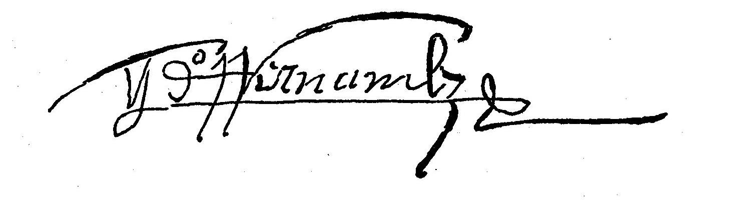 Signature of Diogo Fernandes de Beja